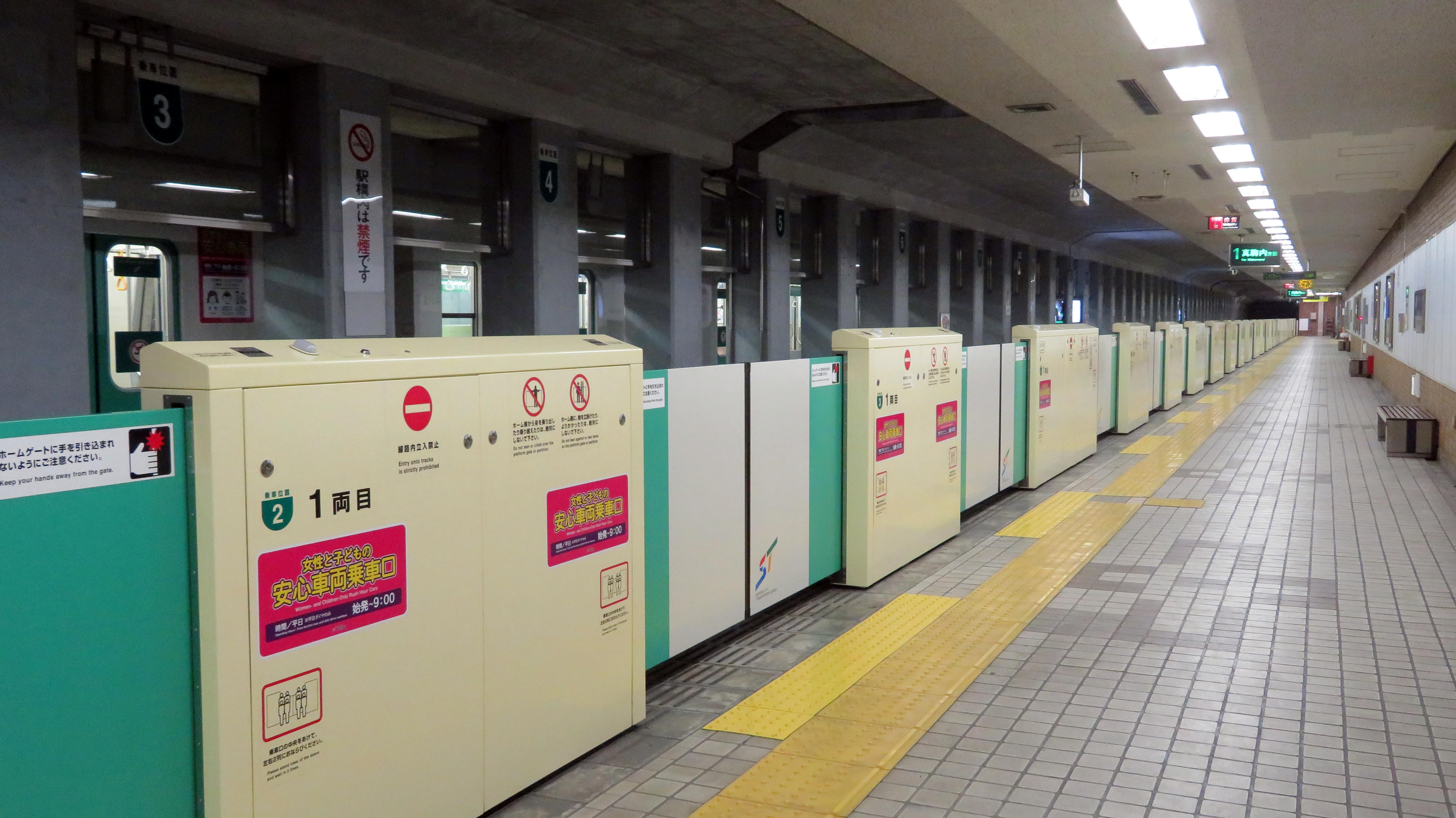 中の島駅ホーム Canon PowerShot SX720 HS